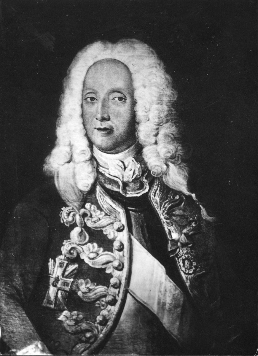 General Hartvig Huitfeldt.